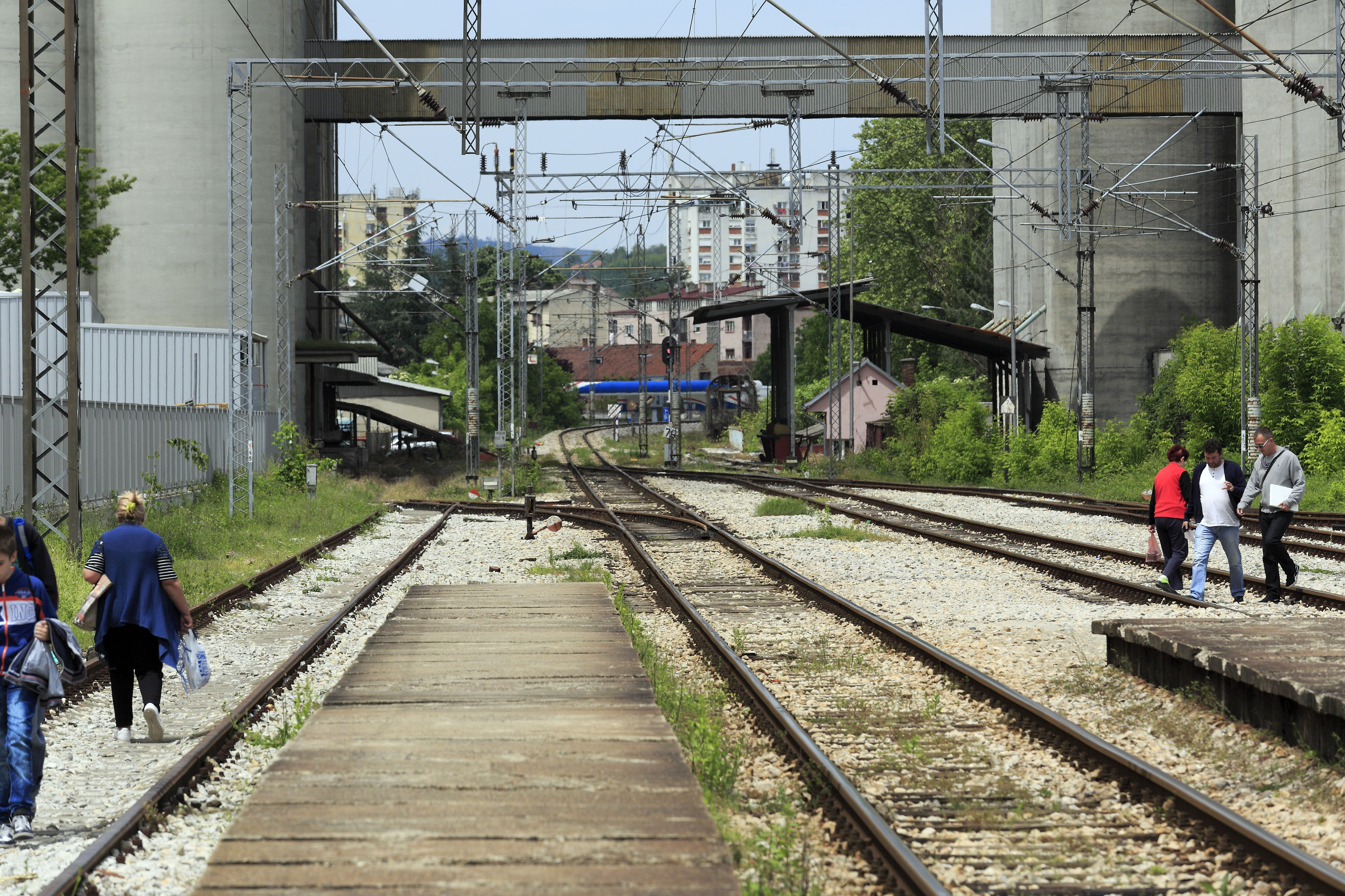 Richtung Norden, durch den anschließenden Bogen ist das heute die Ausfahrrichtung Požega. Zu Zeiten des Scmalspurbetriebes verließ in diese Richtung auch die Strecke nach Lazarevac den Bahnhof.